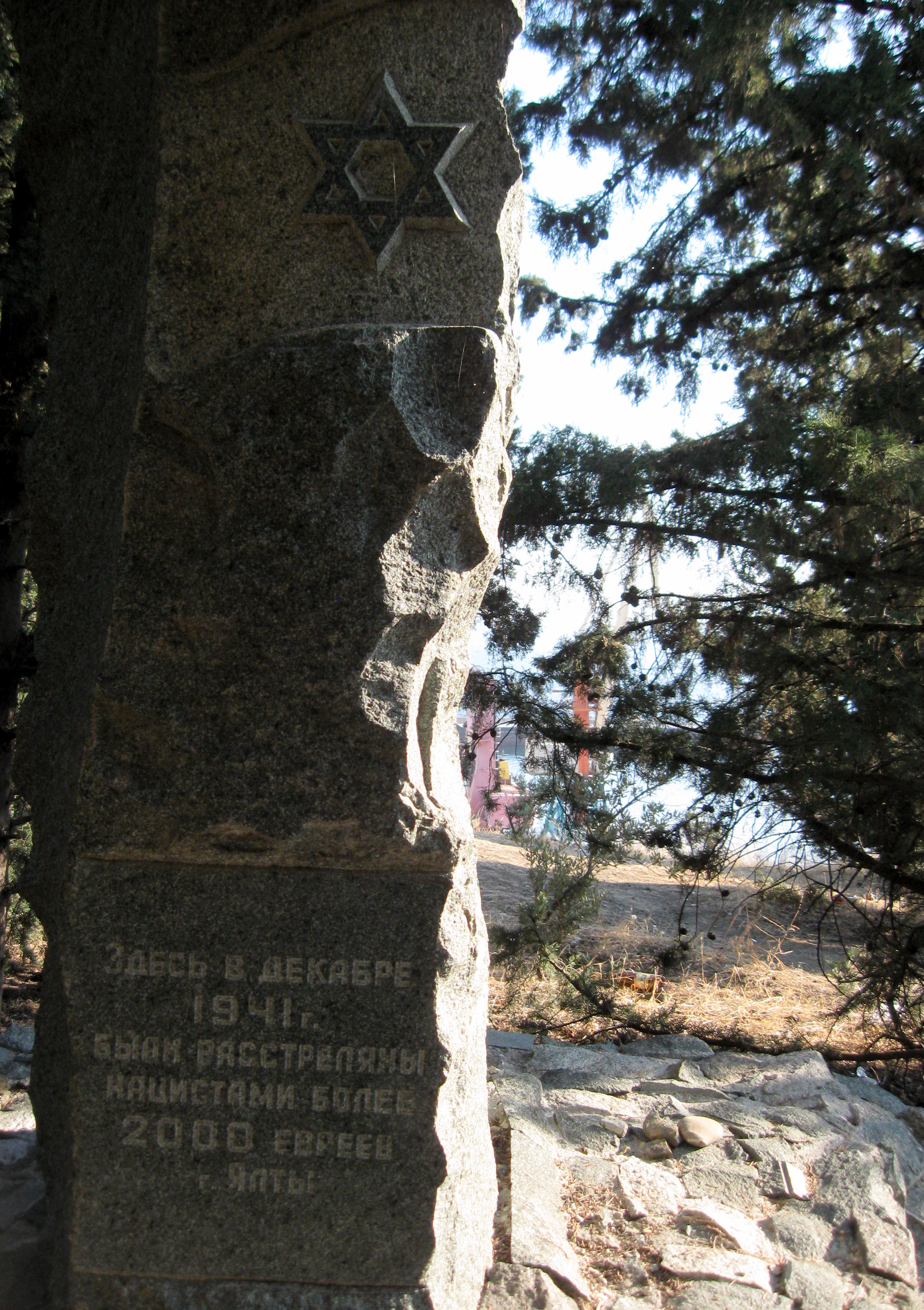 Памятник жертвам холокоста в г. Ялта